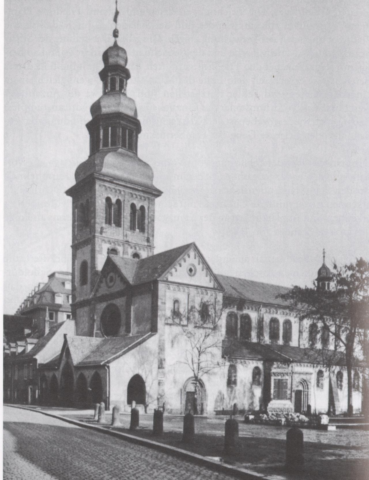 Martinskirche Worms 1910, mit barockisiertem Turm.